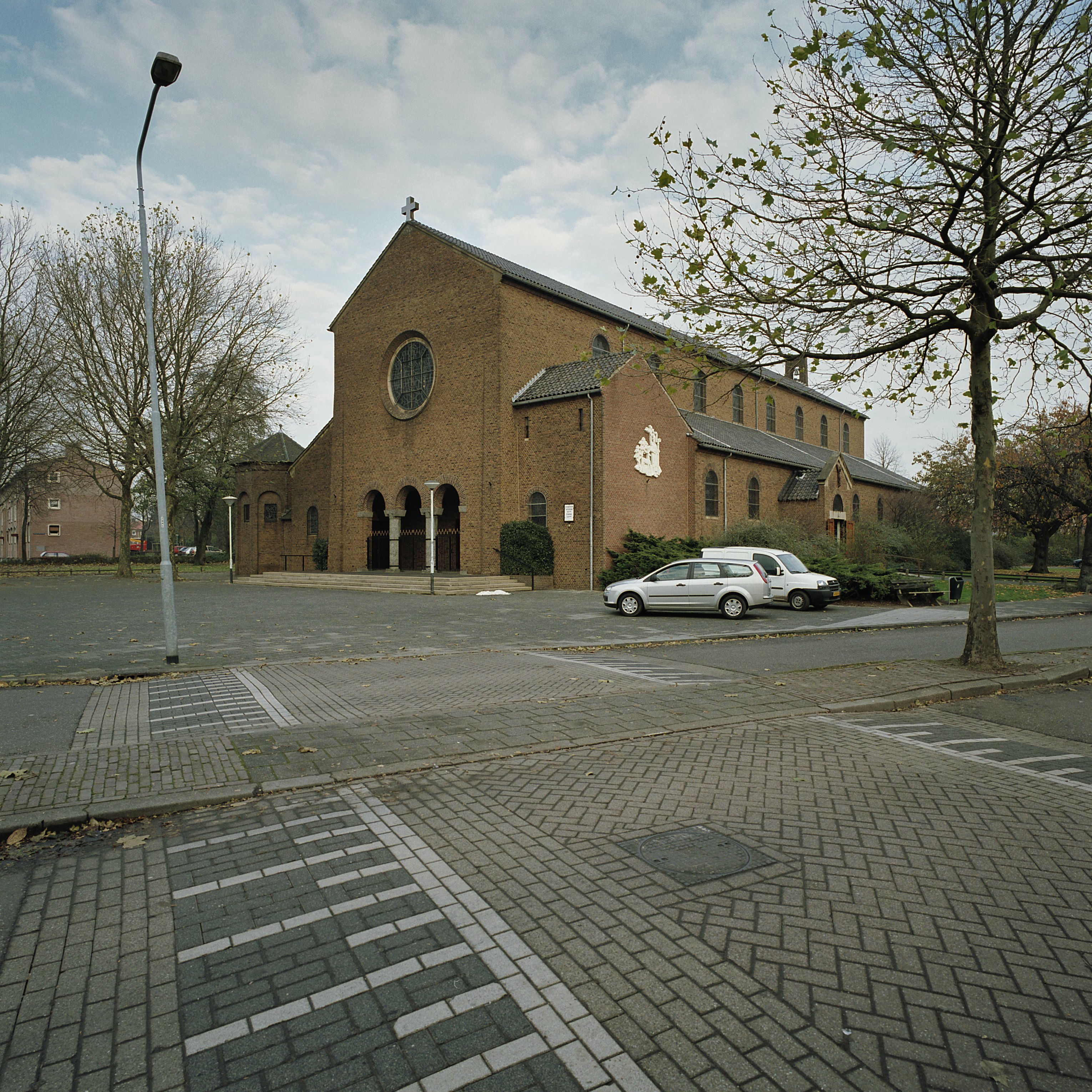 Woonwijk Hazenkamp: Overzicht westgevel en zuidgevel van de Parochiekerk (opmerking: Wederopbouwproject) - Blerick, St Hubertusplein 1 - Hubertuskerk